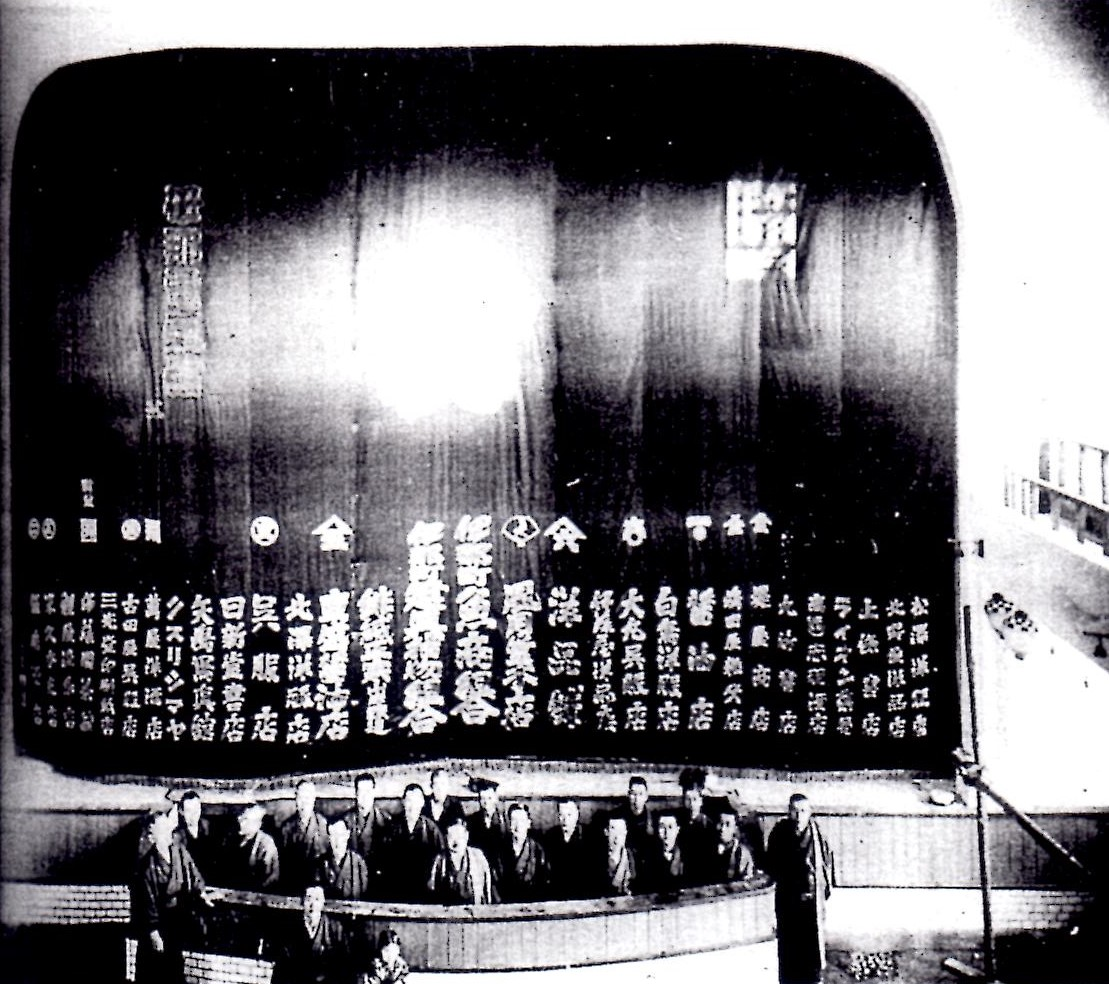 長野県伊那市・伊那電気館 大正末期